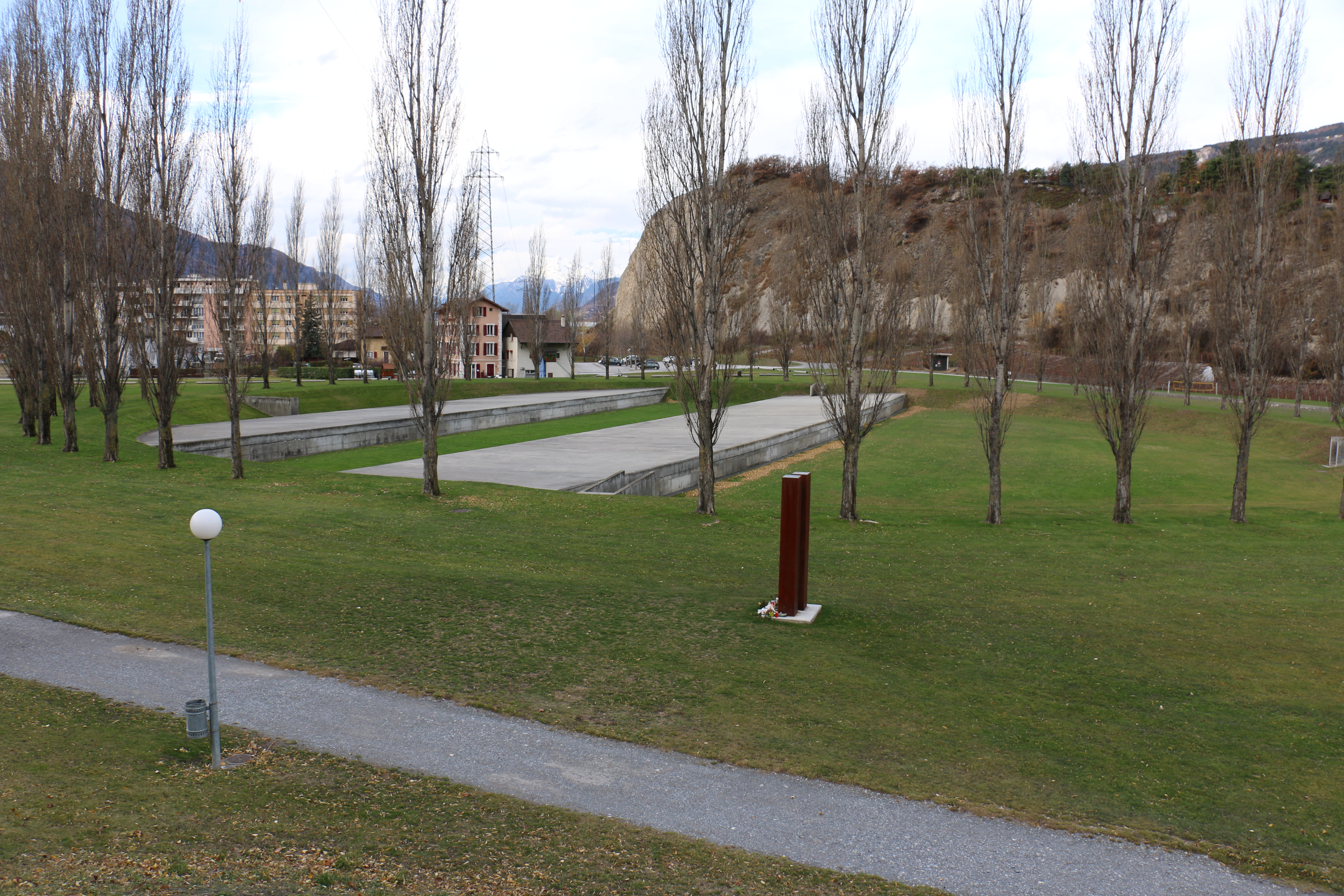 Un monument à la mémoire des victimes de l’accident de car de Sierre, l’Espace Auguste Piccard à Sierre.